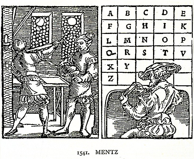 De chalcographiae inventione poema ecomiasticum. (Moguntiæ: excudebat Franciscus Behem, 1541) (Mainz: Franz Benem, 1541)